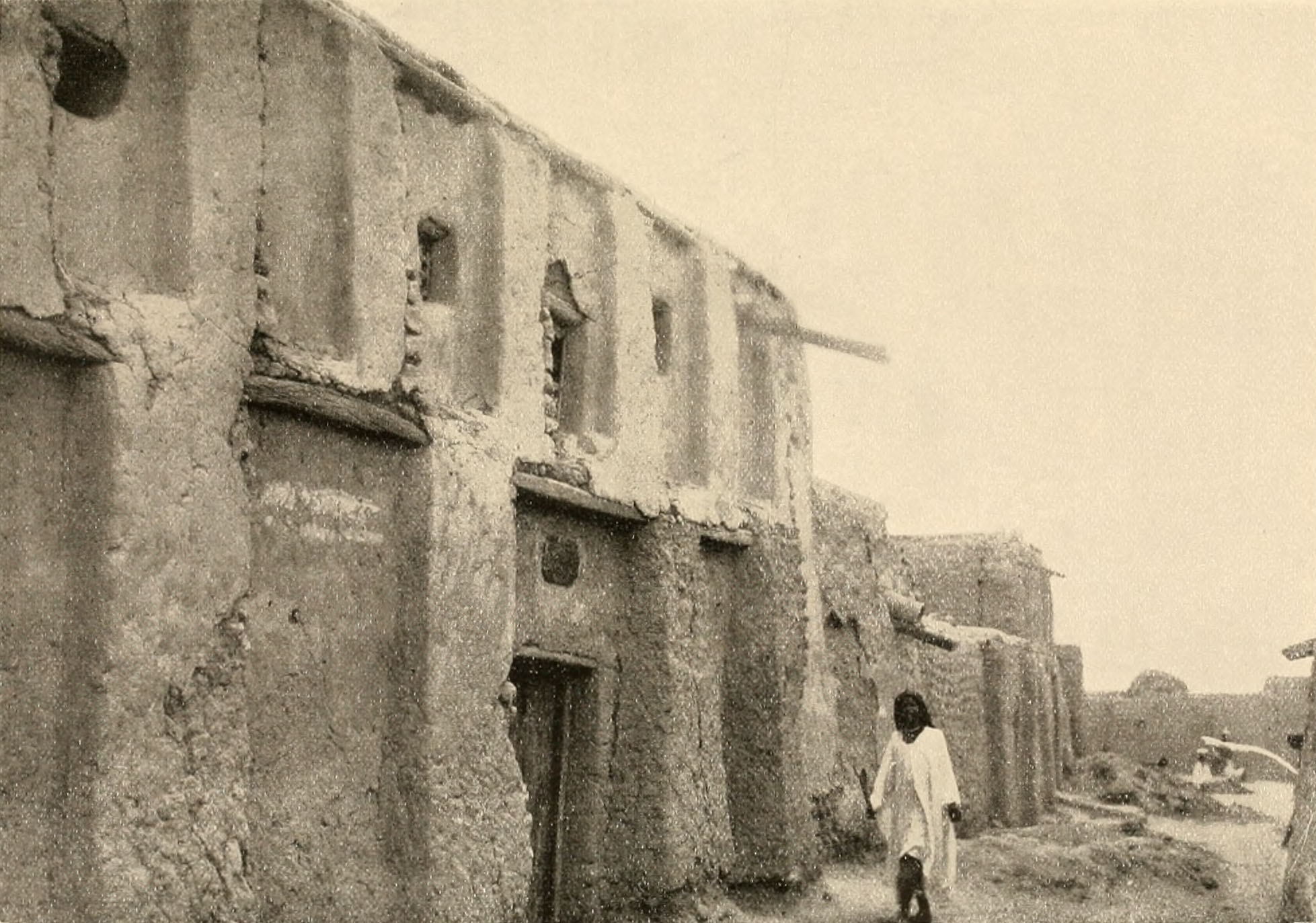 “Timbuktu, das Haus in dem Heinrich Barth wohnte, vor dem Einsturz” - from Expeditionsbericht der Zweiten Deutschen Inner-Afrika-Expedition (1907-09) Auf dem Wege nach Atlantis. between p. 208 and 209